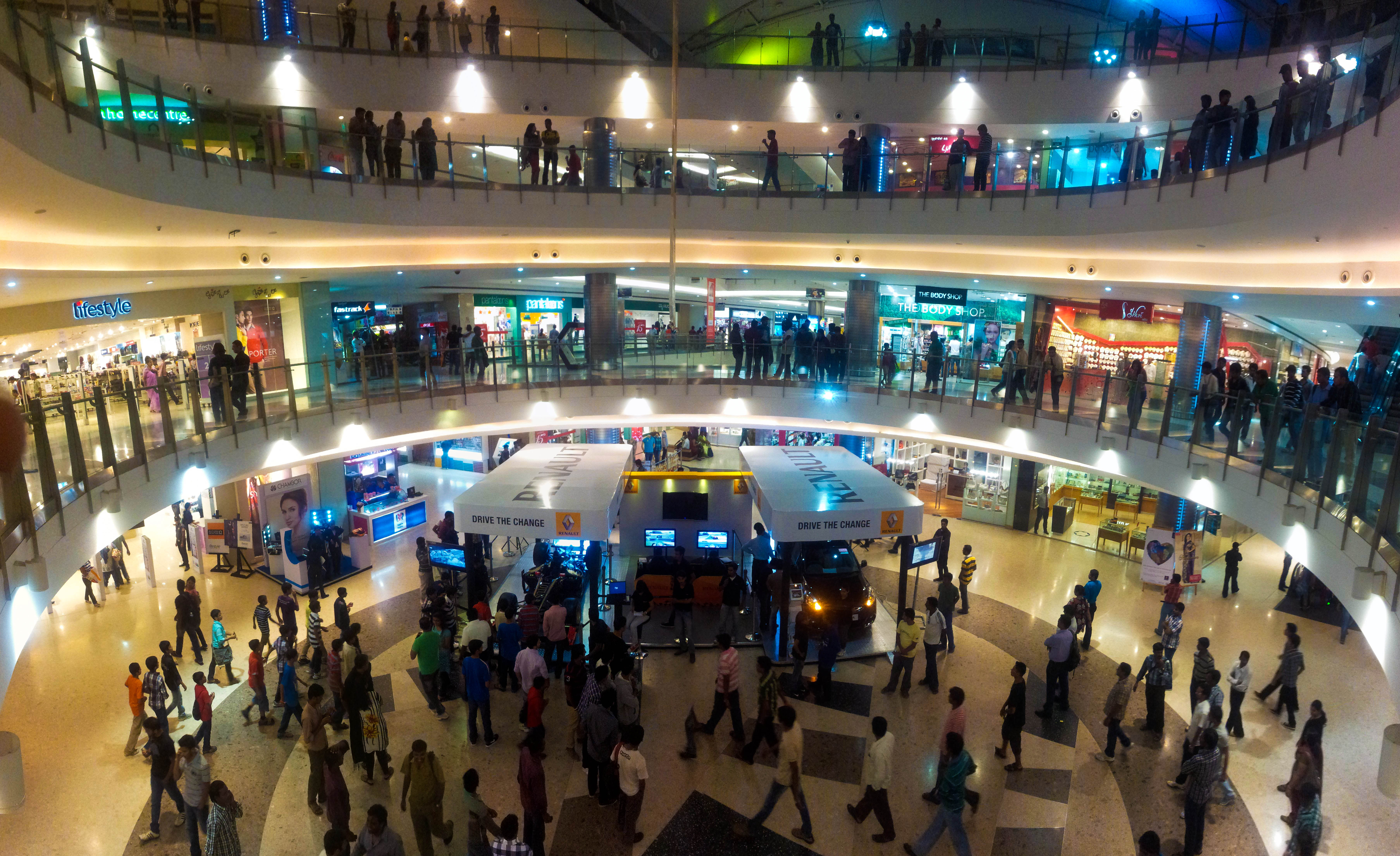 Mantri Square Mall